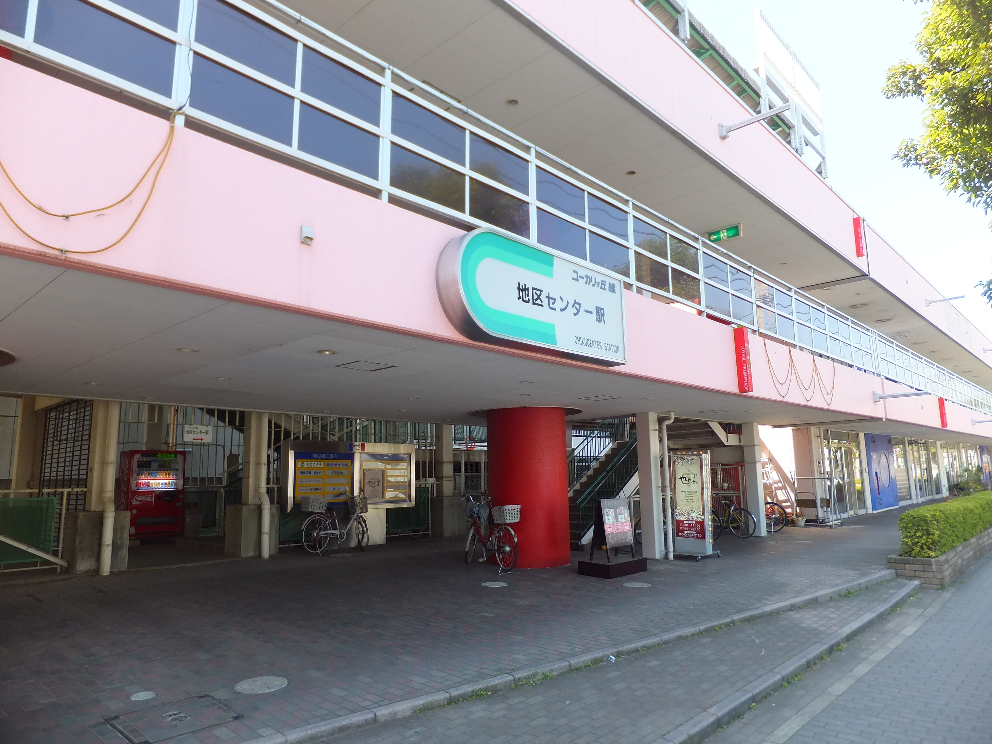 山万ユーカリが丘線地区センター駅入口